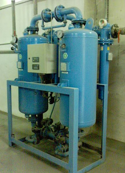 Osuszacz absorbcyjny